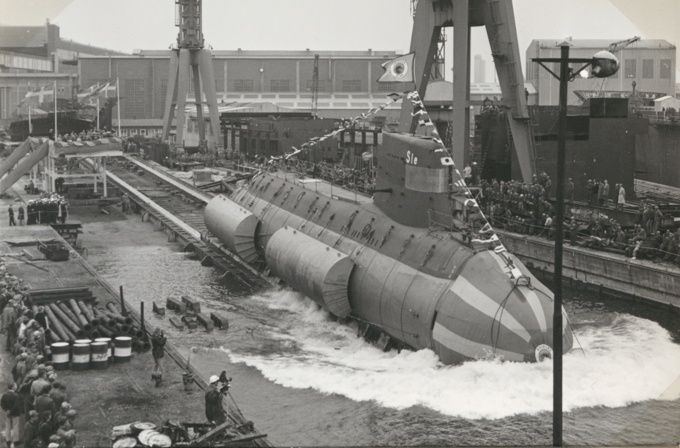 Den svenska ubåten HMS Sjölejonet (Sle) sjösätts.